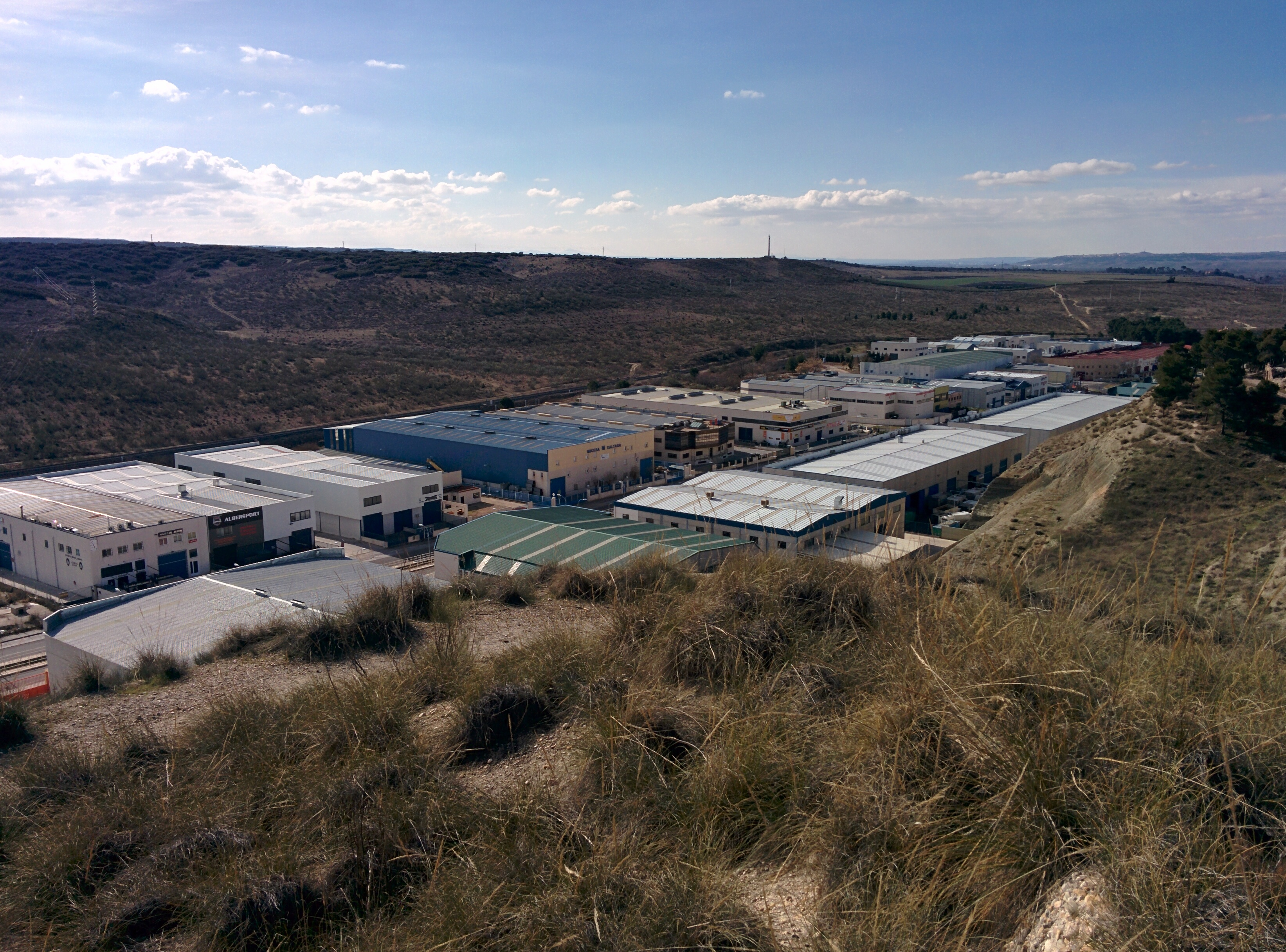 Polígono Industrial Gonzalo Chacón, en Aranjuez (Madrid, España).